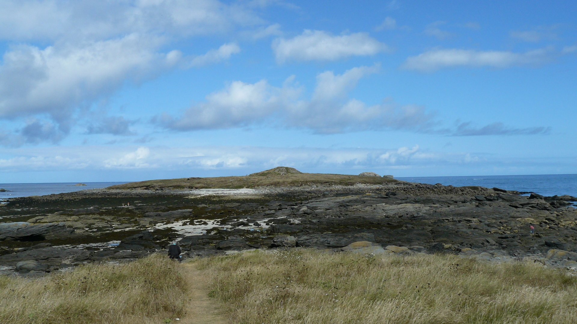 L'île Carn, îlot côtier sur la commune de Ploudalmézeau, dans le Bas-Léon, en Finistère, en Bretagne. Vue du sud-est. Dans le prolongement du sentier, la chaussée de rochers qui mène à l'île, accessible à marée basse, comme sur la photo. Au centre de l'île, s'élève un cairn d'environ 4200 avant J.-C.